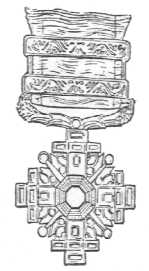 Monglischer Orden der Stützen des Staates